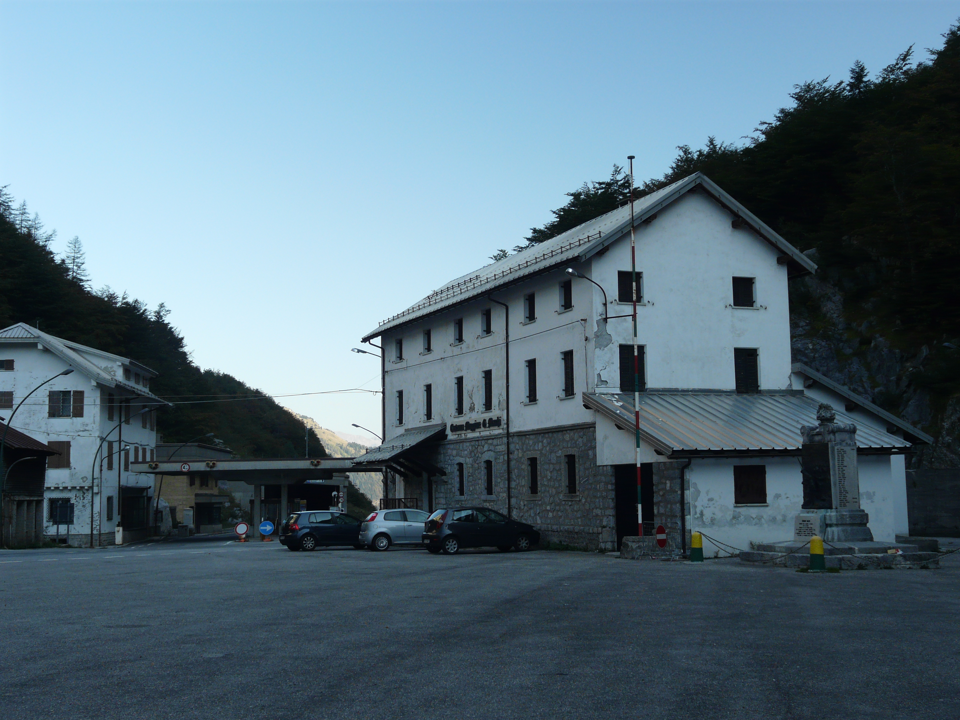 Der Plöckenpass in den Karnischen Alpen, gelegen auf 1357 Metern Höhe.